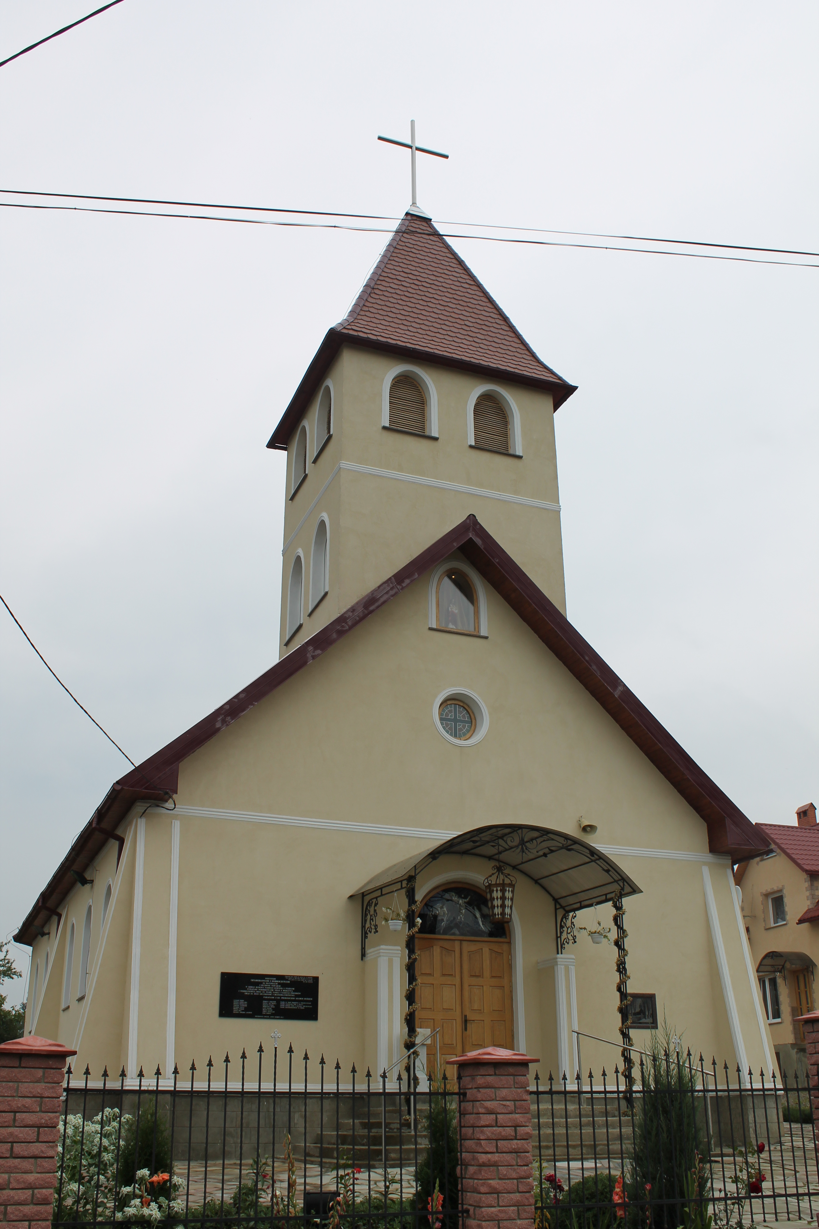 Костьол (Преображення Господнього) (дер.), с. Нижні Петрівці